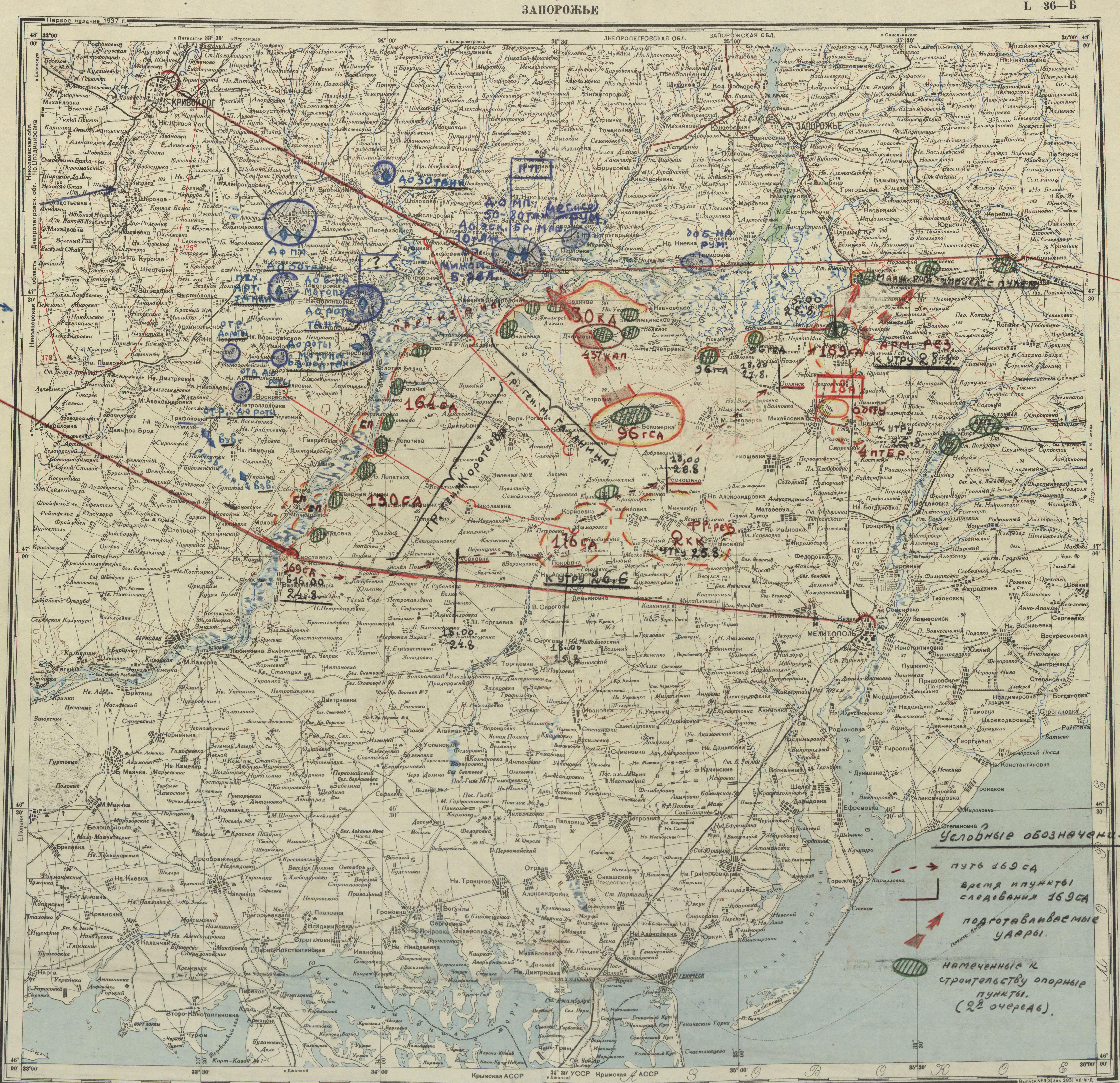 La défense de Zaporojie en août 1941